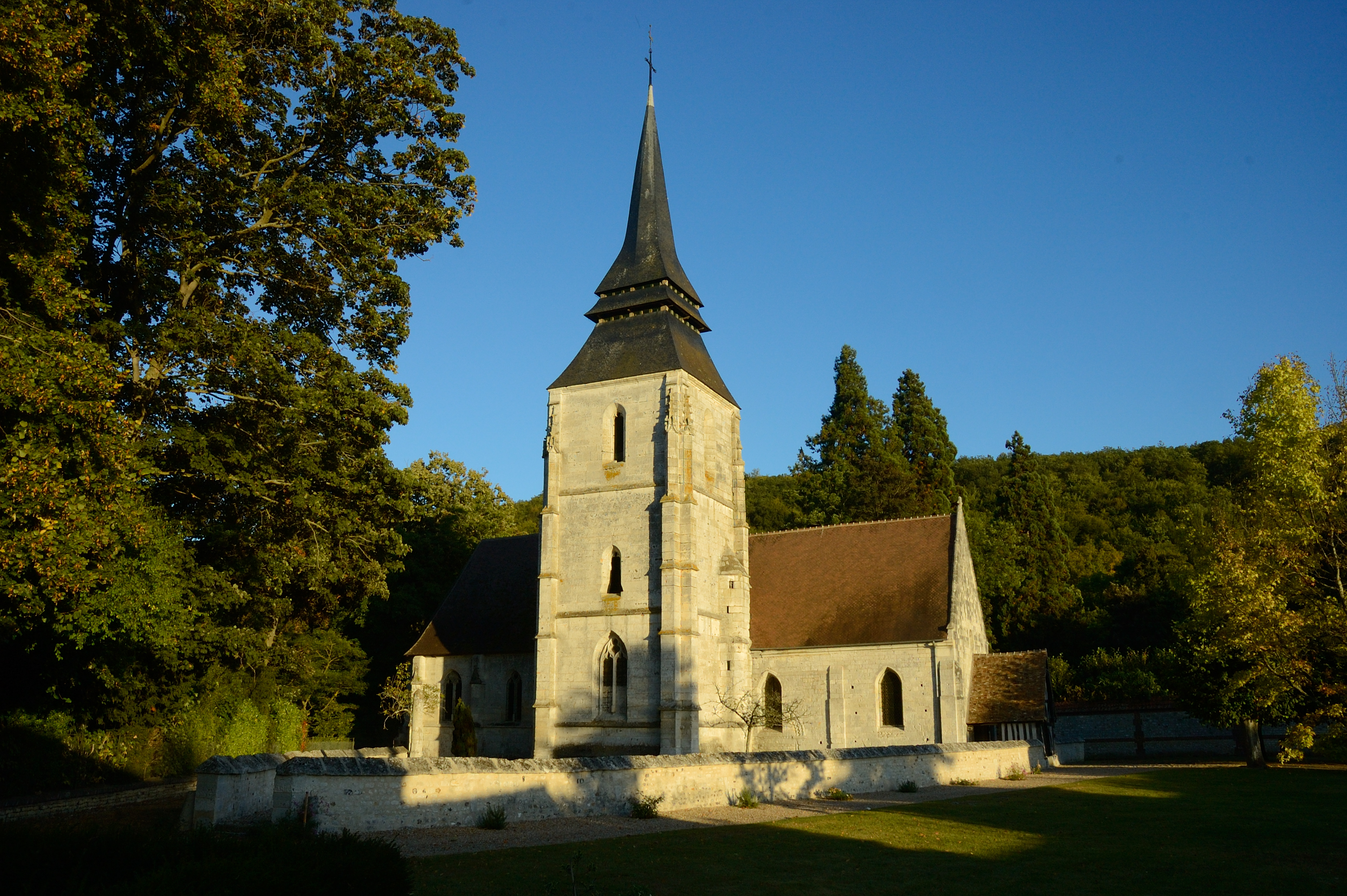 Eglise à Amfreville-sur-Iton .